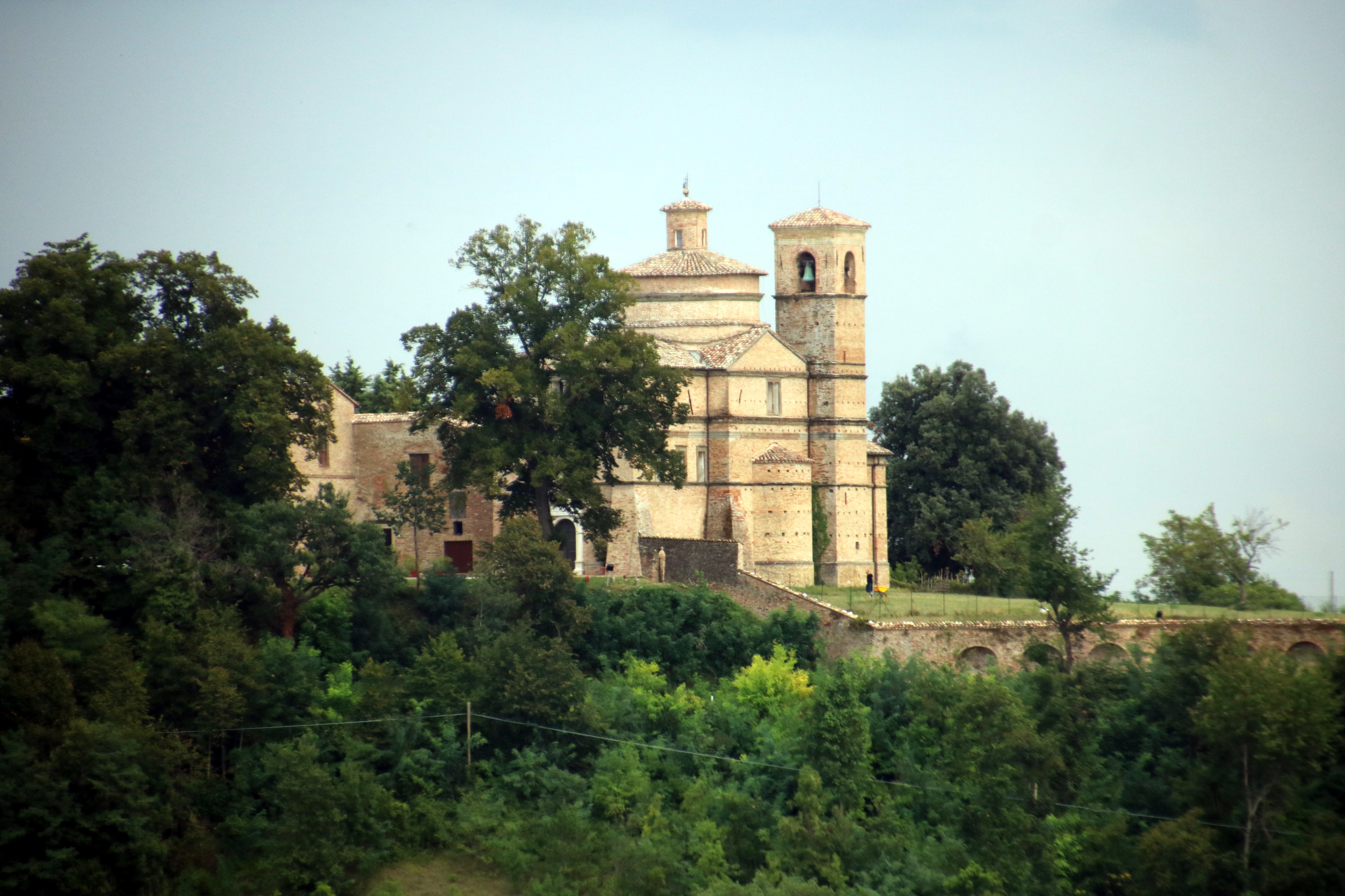 chiesa di San Bernardino This is a photo of a monument which is part of cultural heritage of Italy.